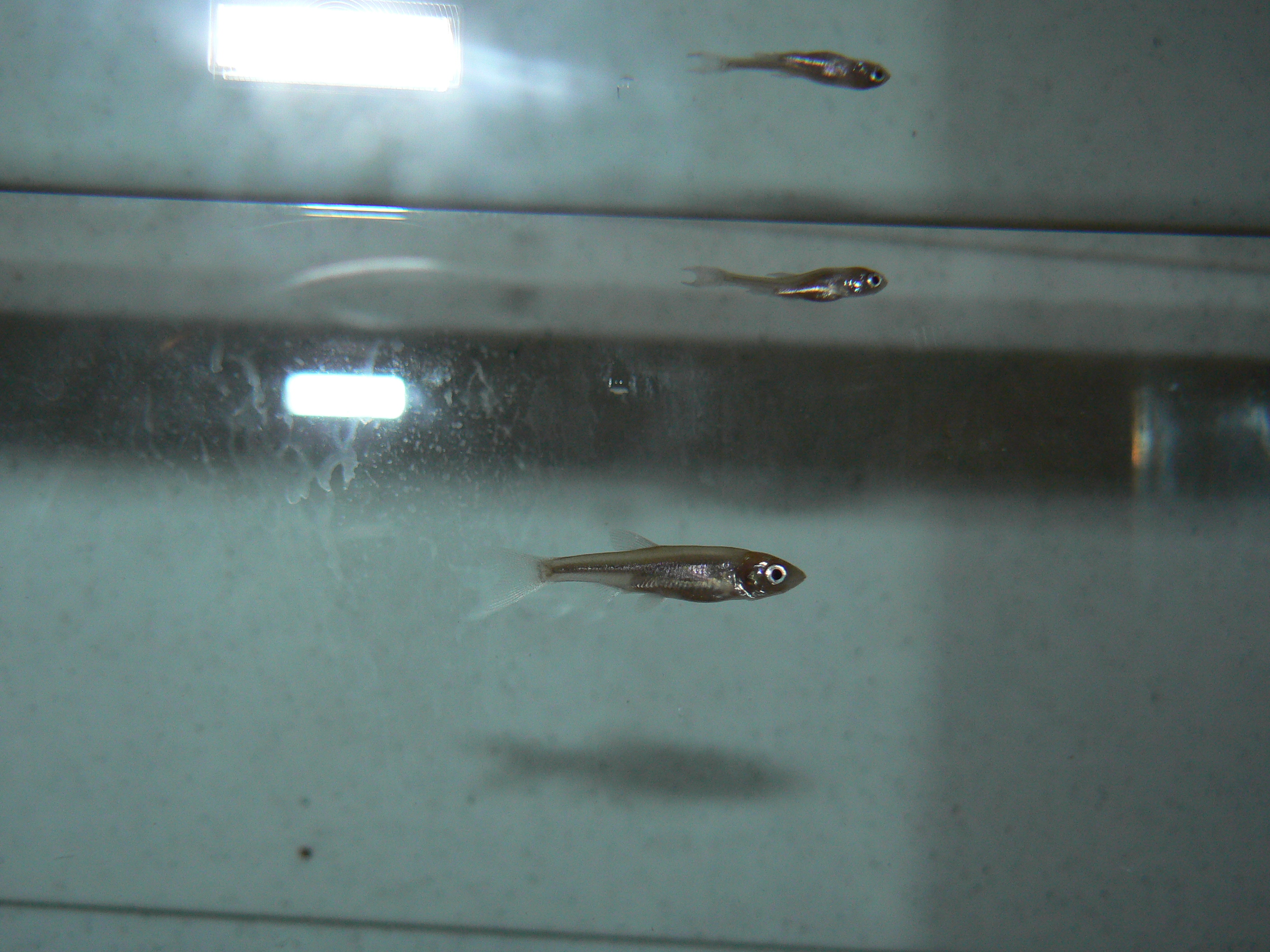 Mladica kleniča (Leuciscus leuciscus)